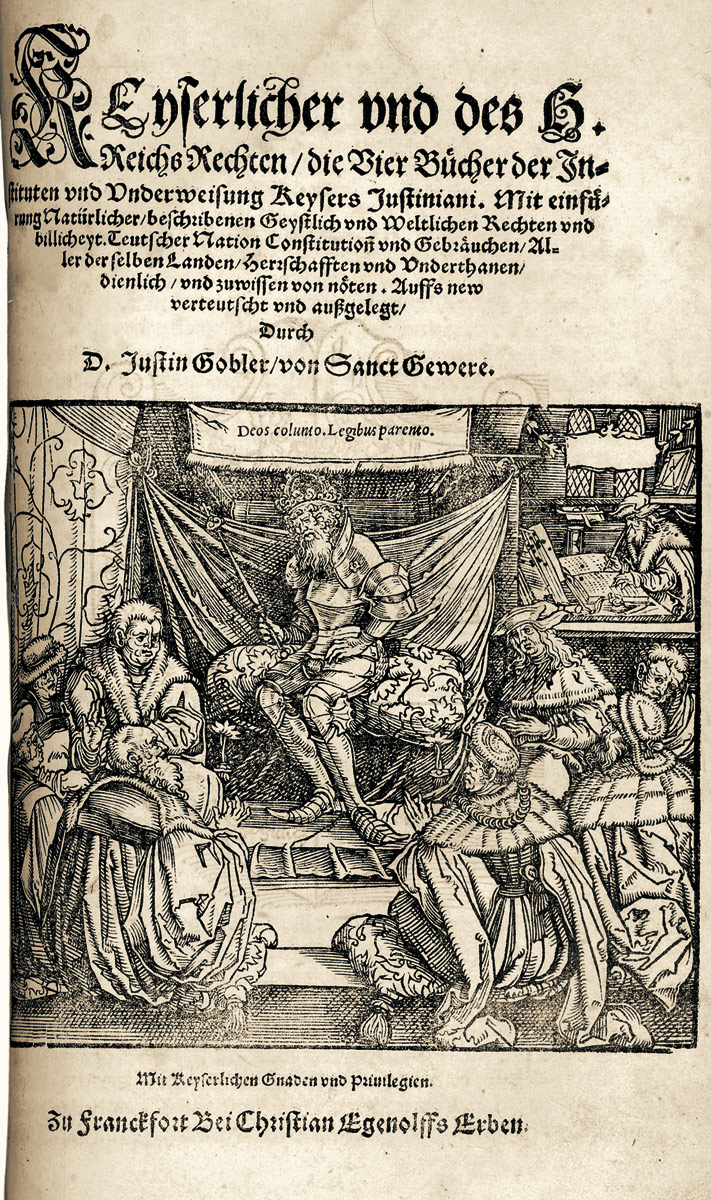 Titelblatt von, Justin Göbler: Keyserlicher vnd des H. Reichs Rechten die Vier Bücher der Jnstituten vnd Vnderweisung Keysers Justiniani. Mit einfürung Natürlicher beschribenen Geystlich vnd Weltlichen Rechten vnd billicheyt ... Auffs new verteutscht vnd außgelegt, Frankfurt, Erben Christian Egenolff, (1557)